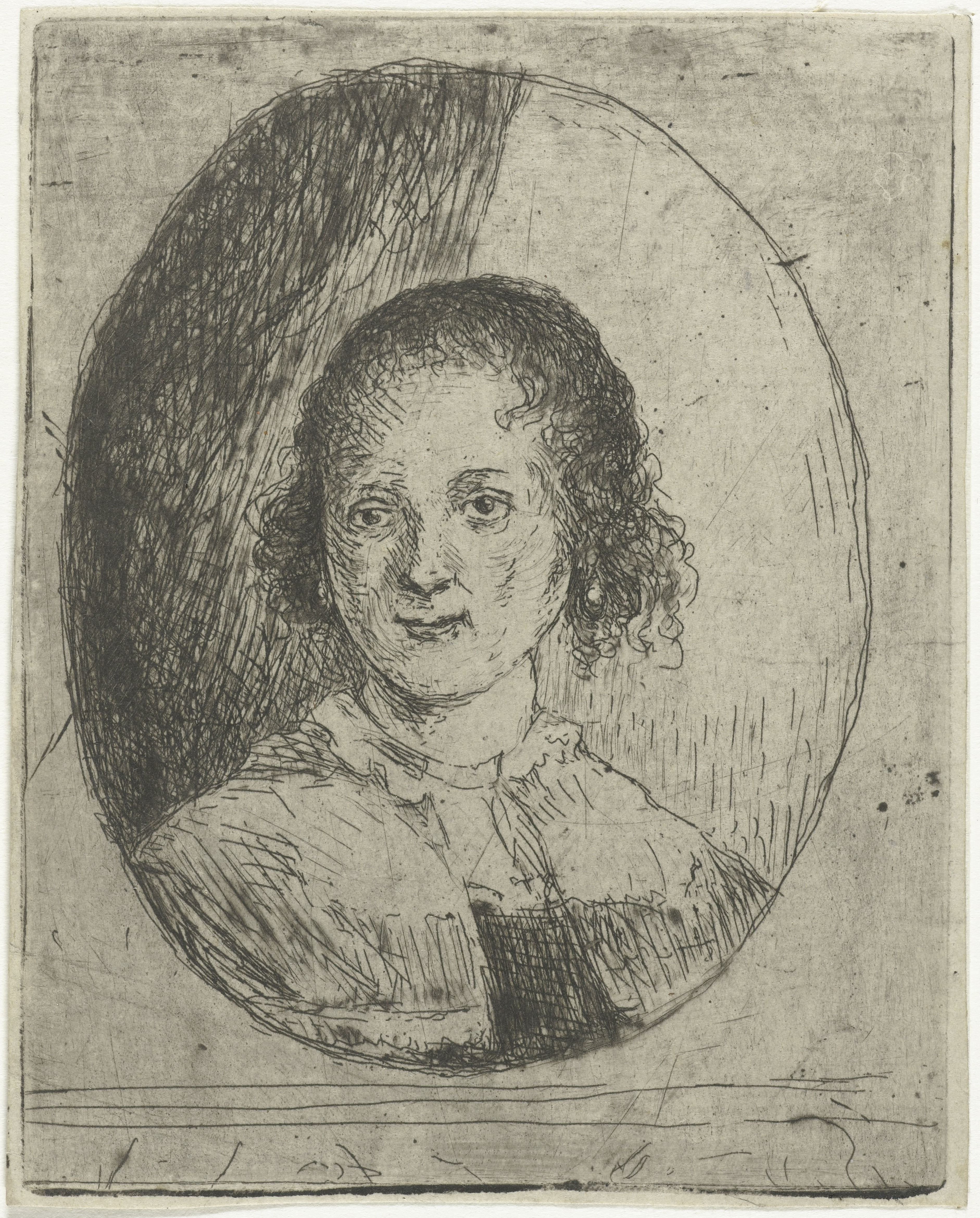 Portret van Christina Chalon door haar broer Jan Chalon